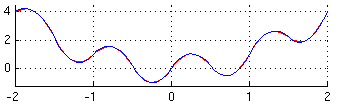 Numerical Integration